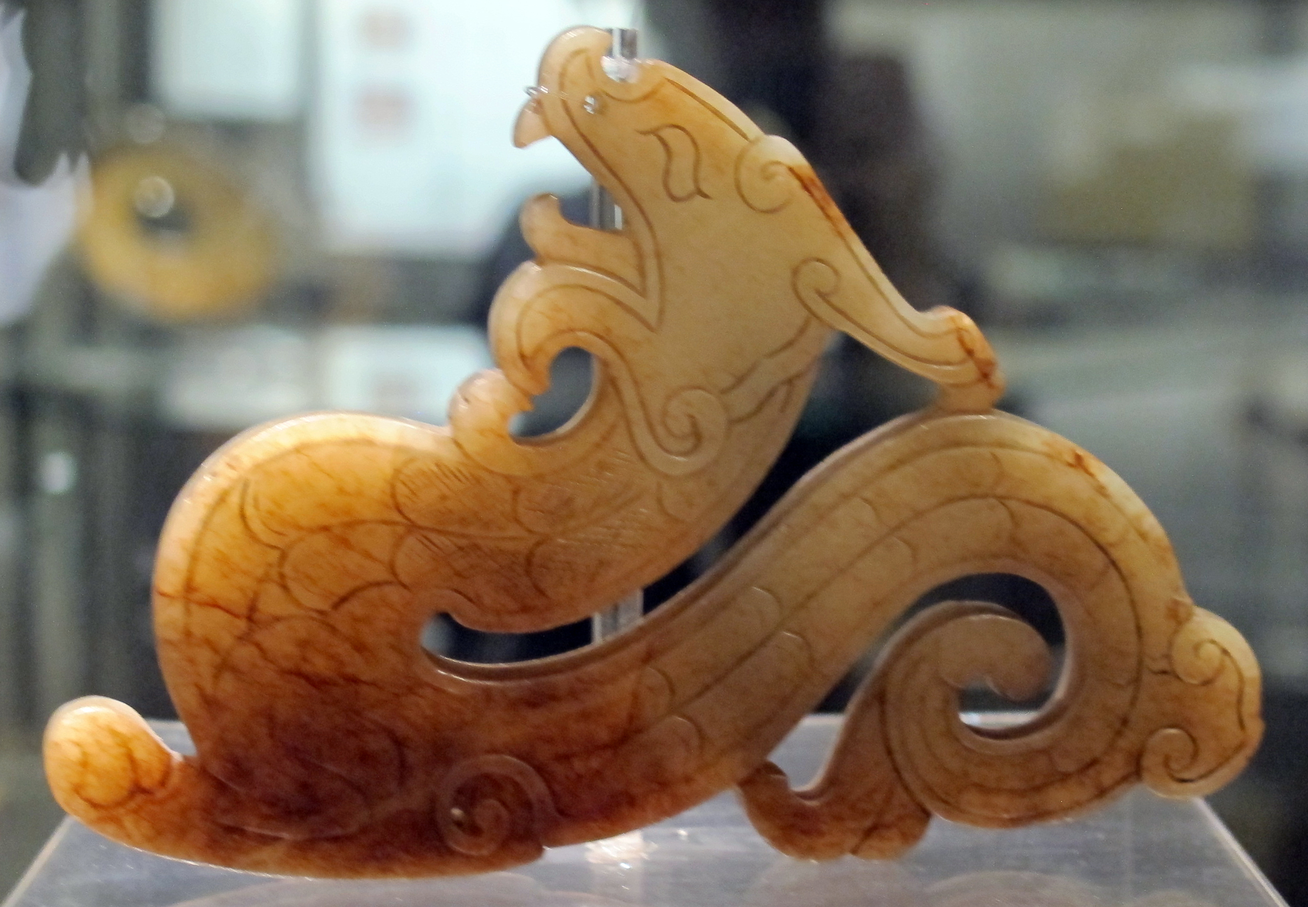 Dinastia zhou occ.le, drago decorativo in giada, 770-256 ac. ca.